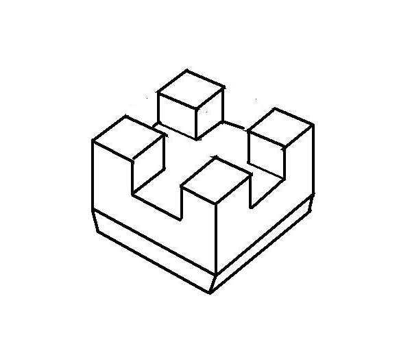 Ludou, bottom element of dou gong 栌斗